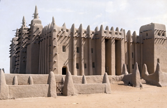 De Grote Moskee van Djenné is gebouwd in 1906-07 op de fundamenten van een oude moskee. Deze oude moskee was de eerste moskee van Djenné, en werd in de 13e eeuw in opdracht van Koy Konboro, de 26e heerser van de stad, gebouwd. In de 19e eeuw is deze eerste moskee als gevolg religieus-politieke conflicten in verval geraakt. In 1906 begon men met de bouw van een nieuwe moskee op de oude fundamenten, die in 1907 gereed was. De moskee is bijna helemaal uit leem gemaakt, met een minimale hoeveelheid palmhout om te constructie te ondersteunen en voor het dak. Het palmhout dient ook als permanente steiger voor de mensen die elk jaar tijdens het lentefestival de moskee opnieuw pleisteren. Daarnaast hebben ze nog een decoratieve functie. Modder wordt gebruikt om het leem van te maken, wat erg goedkoop is. Het duurdere hout wordt vanwege de kosten zo min mogelijk gebruikt. Daarnaast is de lemen constructie gunstig in het hete klimaat: de dikke muren absorberen overdag de hitte en raken deze hitte 's nachts weer kwijt, zodat de moskee overdag koel blijft. De Grote Moskee van Djenné heeft daarnaast nog speciale dakventilatie bedekt met keramische kappen die 's nachts kunnen worden verwijderd om de ruimtes te ventileren. Op de toppen van de torens worden vaak struisvogeleieren gelegd, wat vruchtbaarheid en zuiverheid symboliseert. Ook op deze foto kun je deze eieren zien liggen. (Otto, 2007)